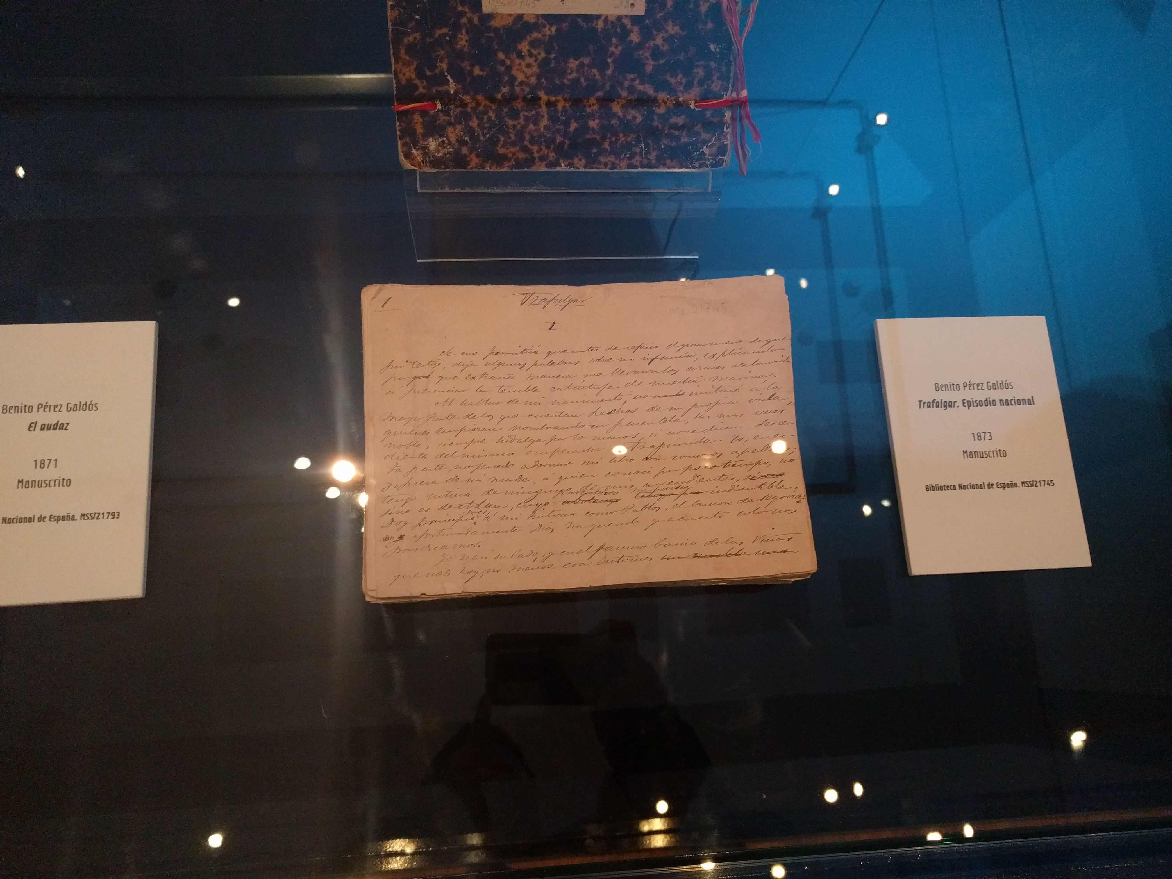 Manuscrito de Trafalgar (episodio nacional) de Benito Pérez Galdós, 1873. Biblioteca Nacional de España.